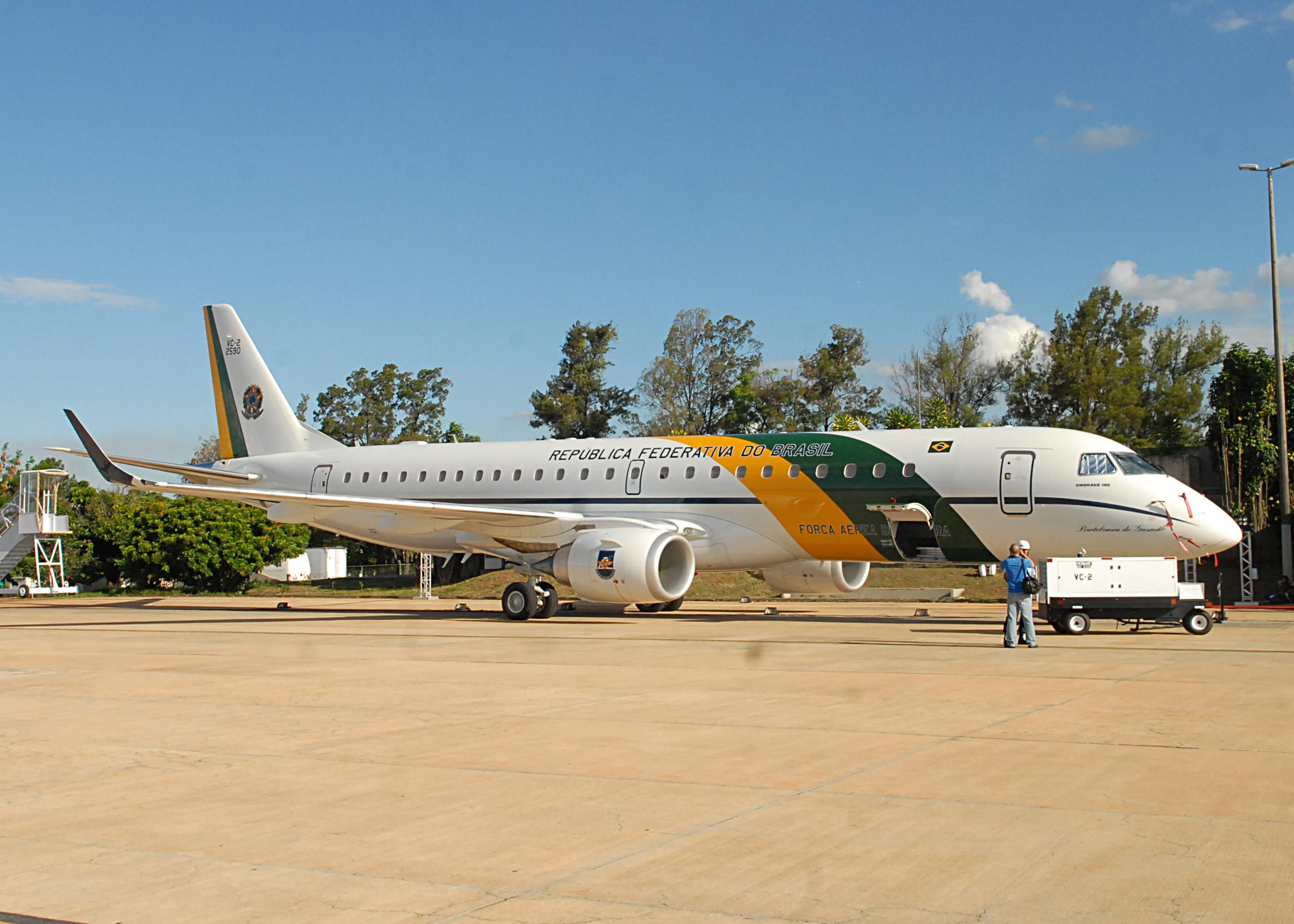 Brasília - A Embraer entrega para o governo brasileiro o primeiro jato Embraer 190, batizado de Bartolomeu de Gusmão, destinado exclusivamente para uso da Presidência da República